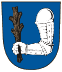 Znak města Kyjov, okres Hodonín